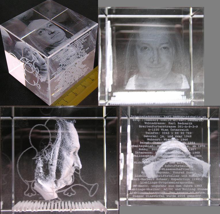 Glasinnengravur. Die Abbildungen im Würfel stellen Benutzer:Karl Bednarik dar.